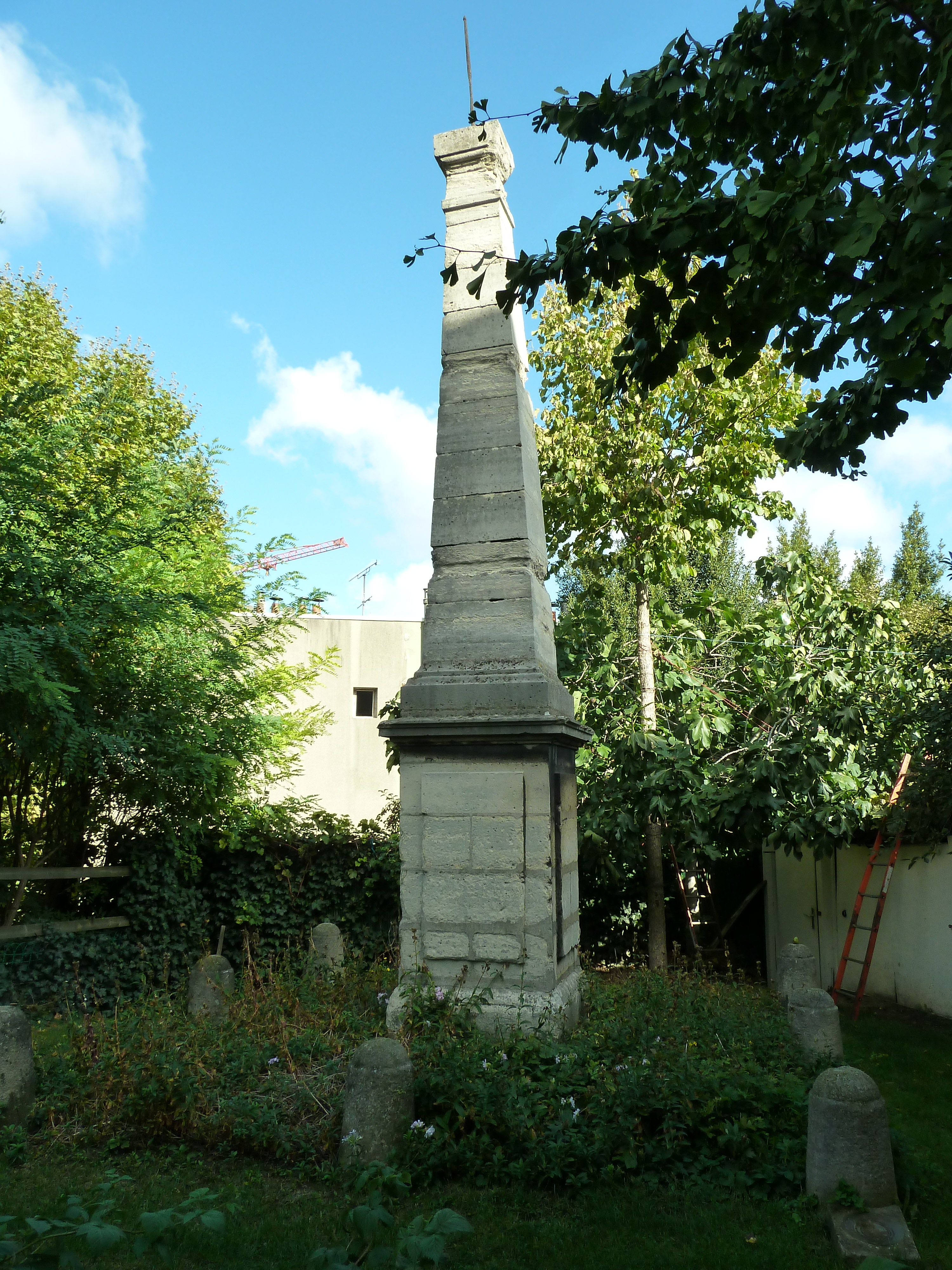 Mire de Cassini - Passage de la Pyramide - Villejuif - Val-de-Marne - Mérimée PA00079916 .